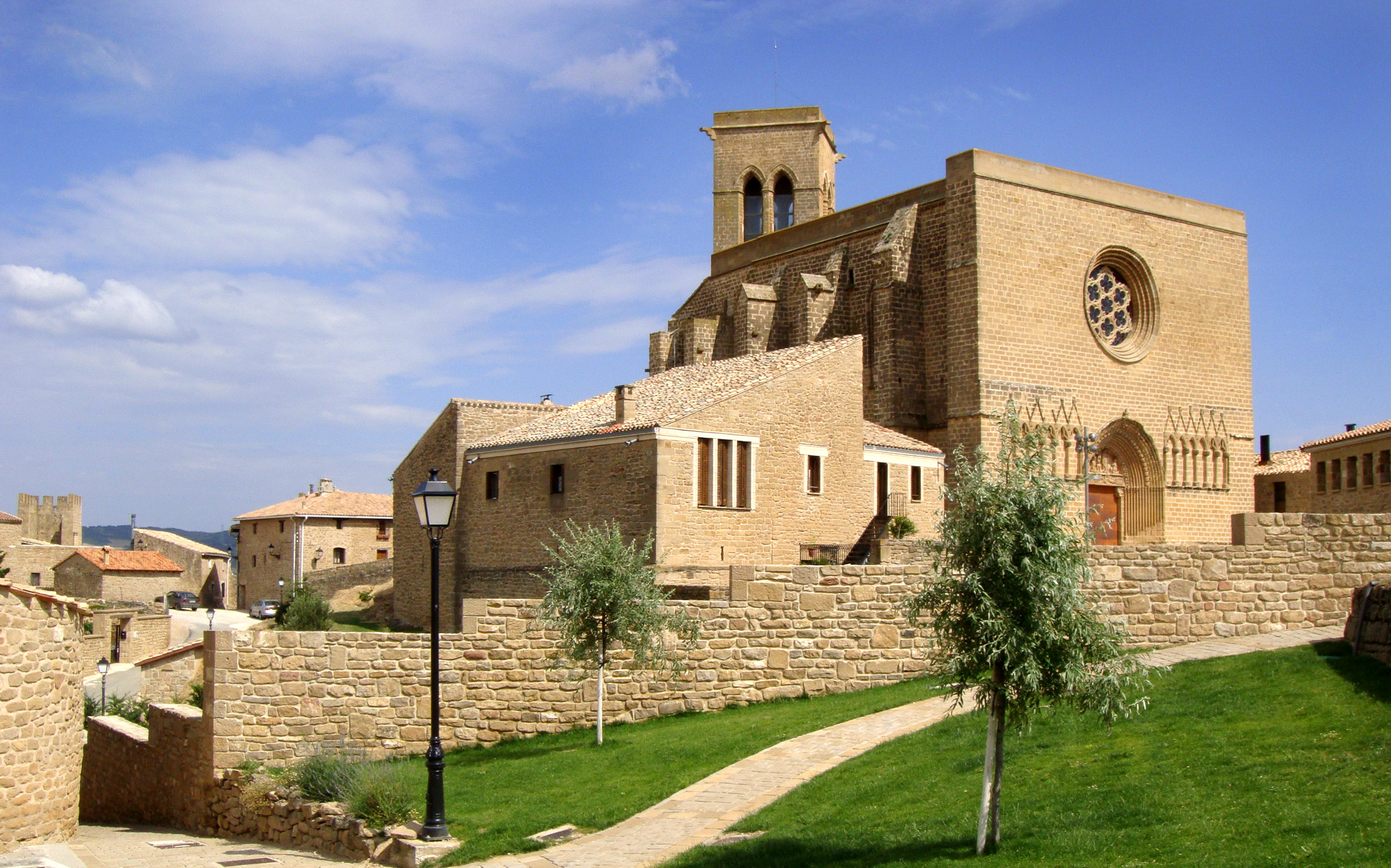 Iglesia del siglo XIII de estilo gótico de influencia francesa